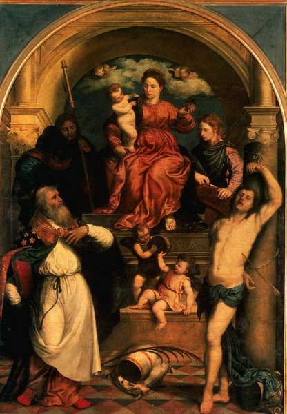 Retabel